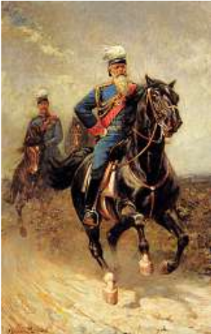 Prinzregent Luitpold als Oberbefehlshaber der Bayerischen Armee zu Pferde